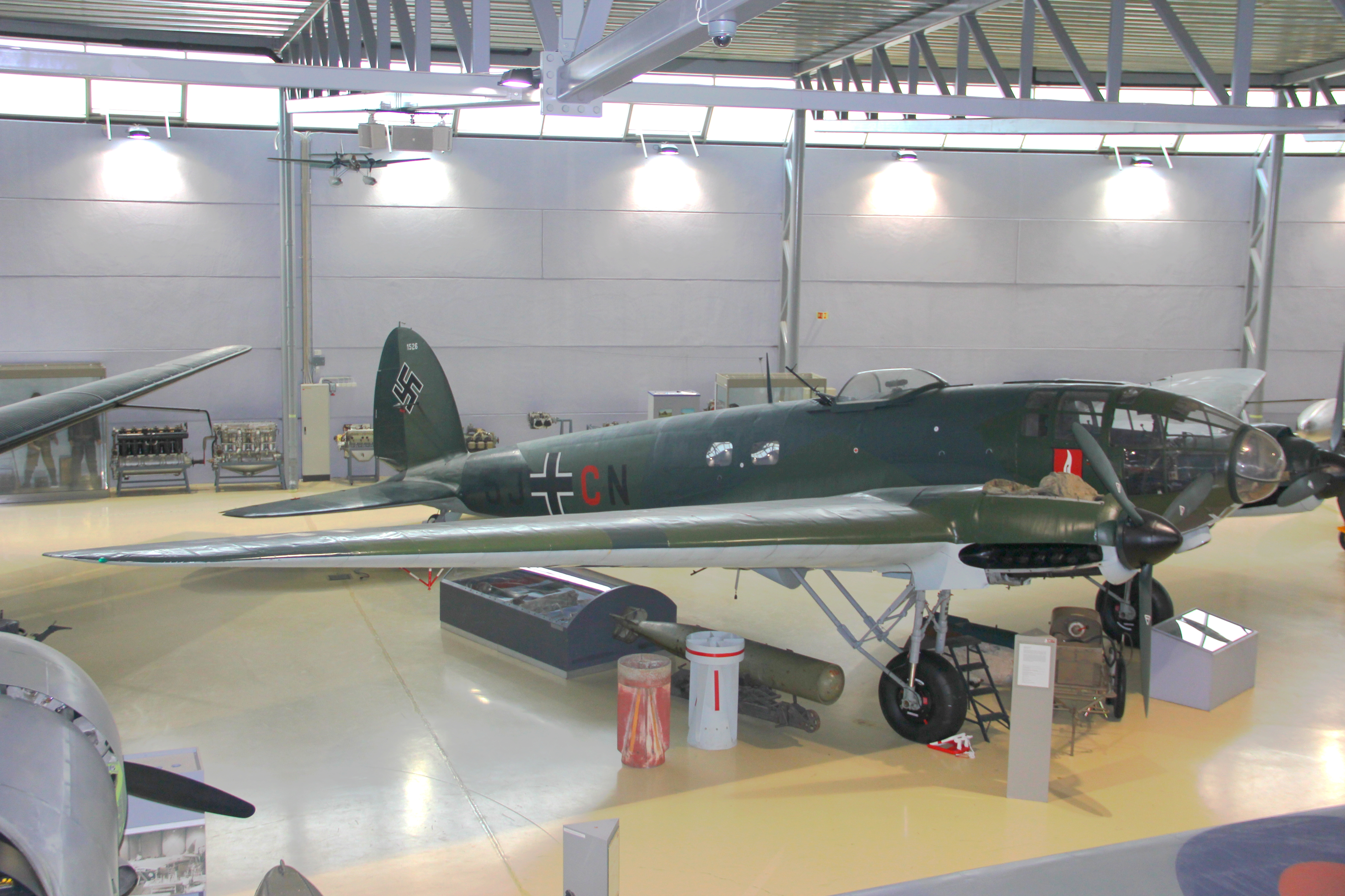 Heinkel He 111 P-2 (Wk Nr 1526)